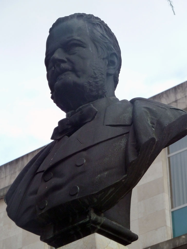 Oviedo